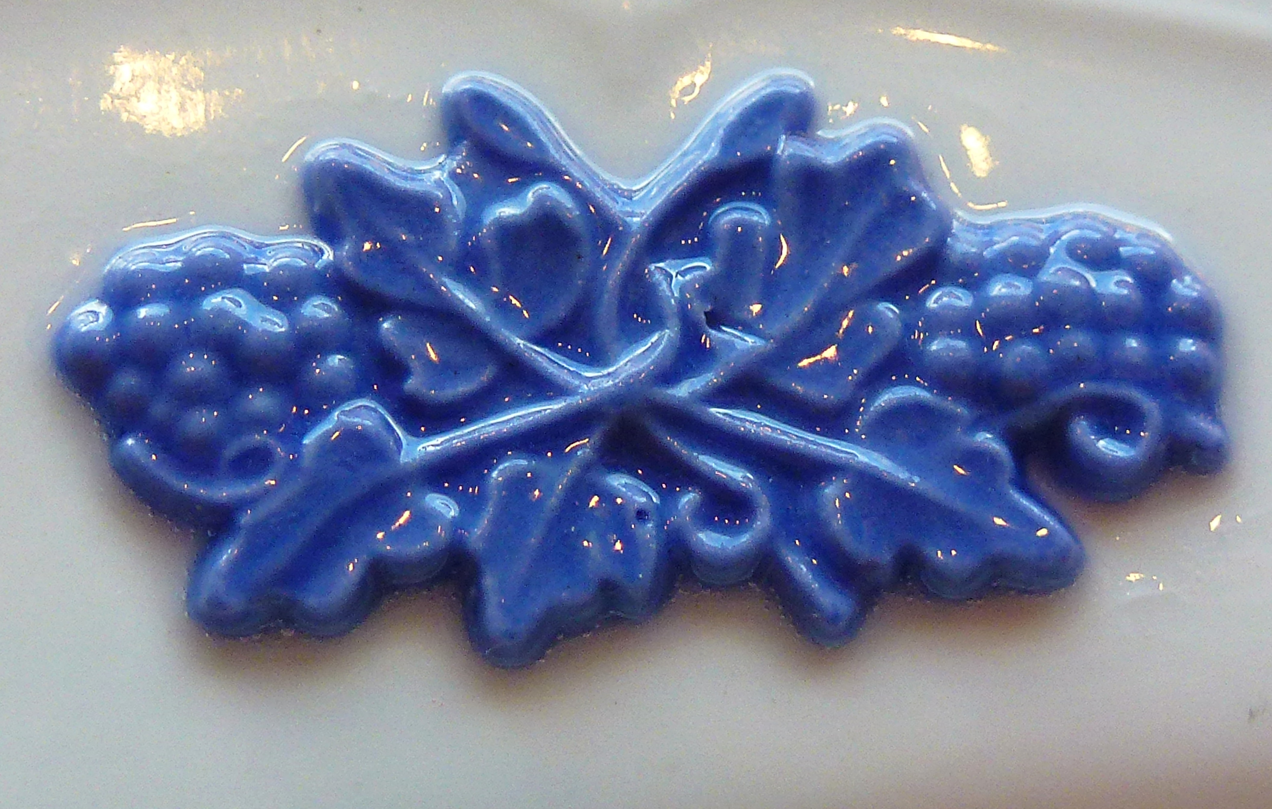 Blå Bloms dekor med vindruvor och vinblad